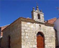 Fachada de la ermita de Nuestra Señora de Monserrat en Villajimena, Monzón de Campos